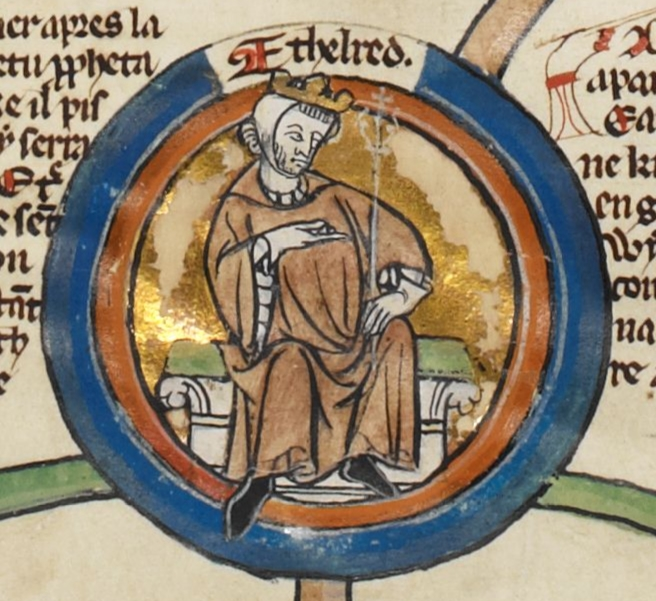 Miniature d'Æthelred le Malavisé dans une généalogie royale du XIVe siècle.